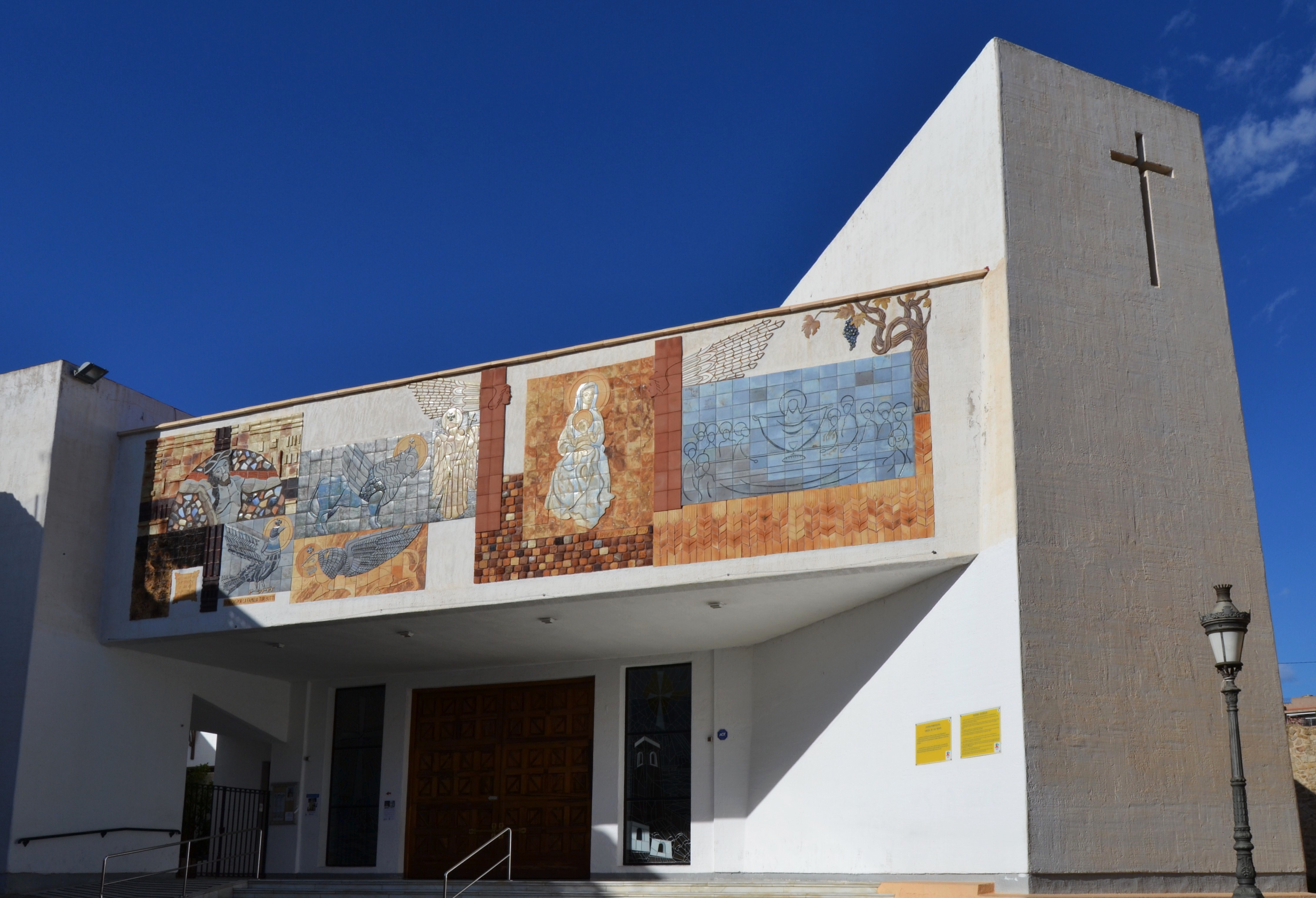 Calp. església de la mare de Déu de les Neus.